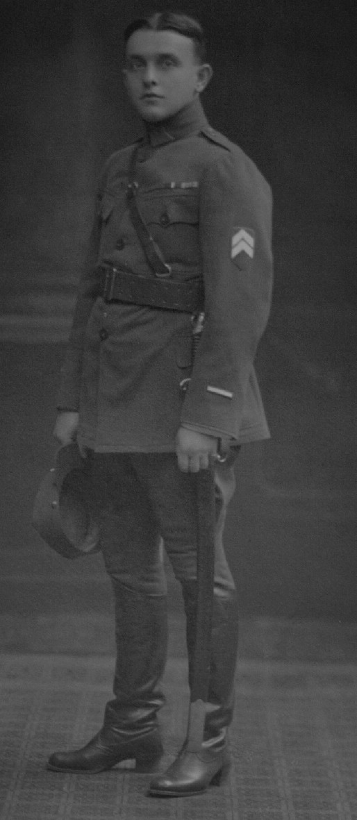 Nadporučík Alois Laub, září 1920, Plzeň.